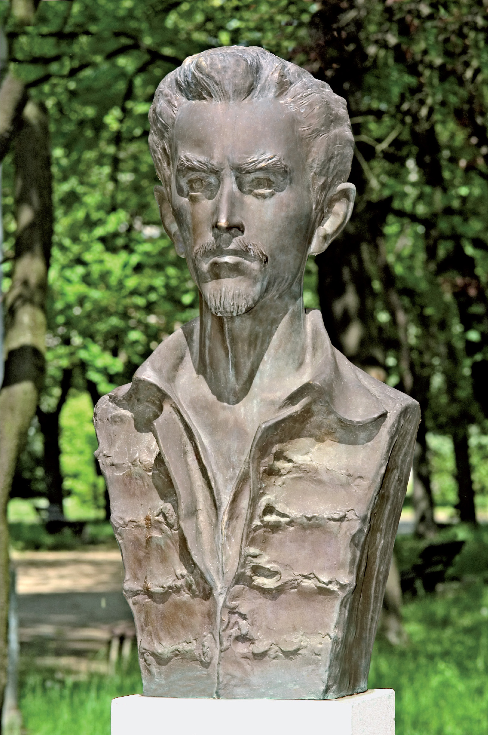 Petőfi Sándor bronz mellszobra a kiskunfélegházi Blaha Lujza téren (80 cm), Pálfy Gusztáv alkotása (1985)